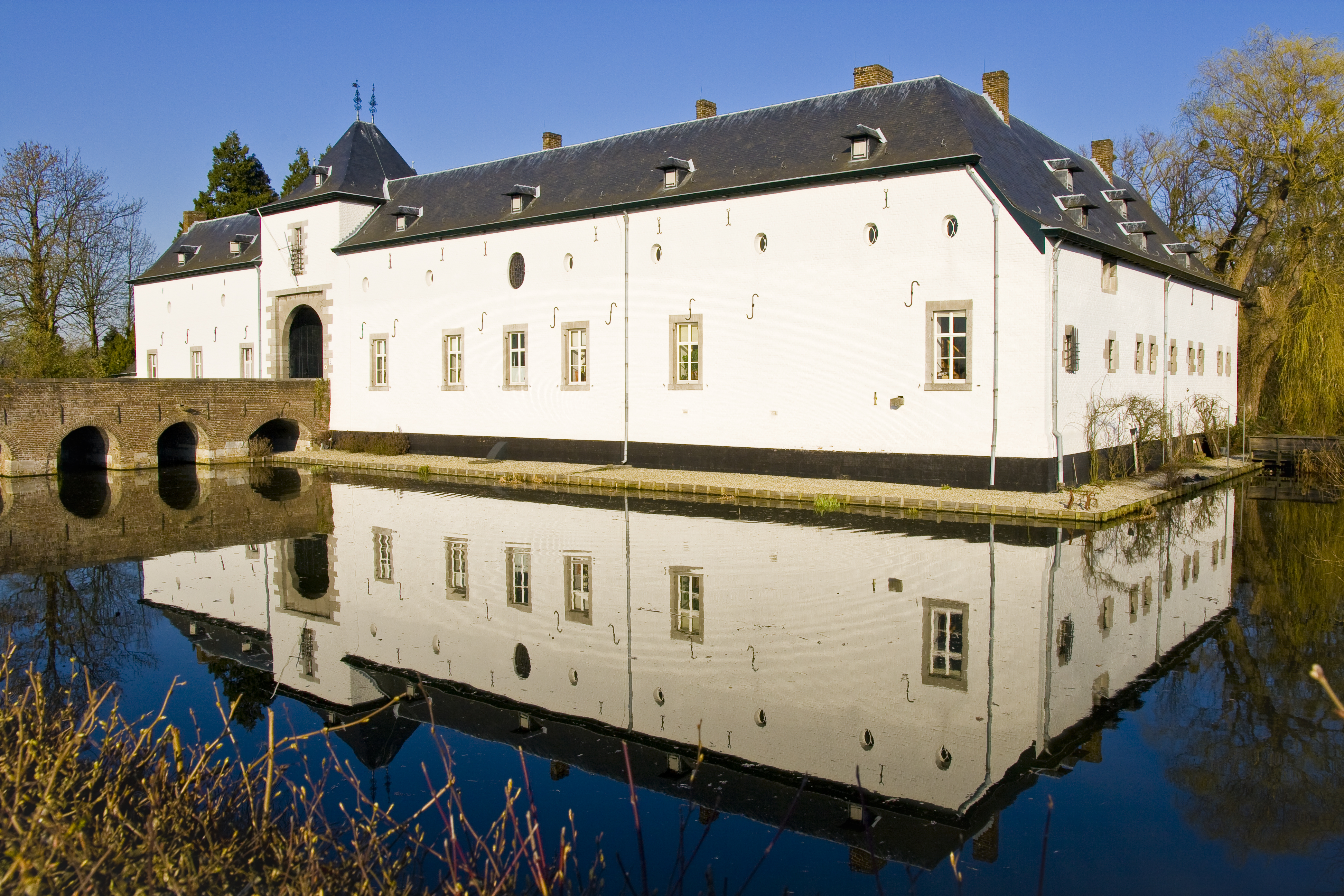 Kasteel van Geulle / Geulle Castle / Château de Geulle